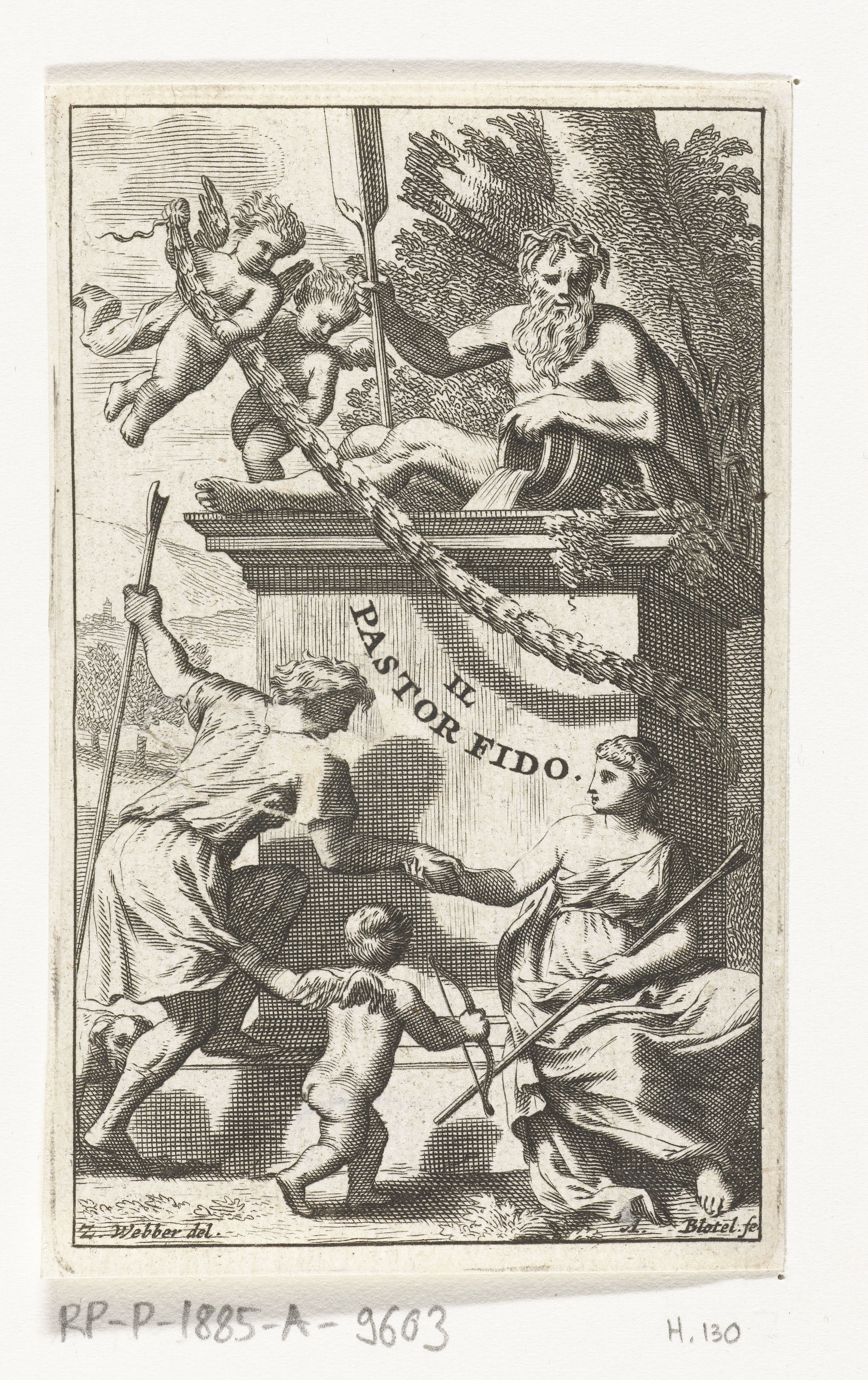 IdentificatieTitel(s): Titelpagina voor G.B. Guarini, Il pastor fidoObjecttype: prent titelpagina Objectnummer: RP-P-1885-A-9603Catalogusreferentie: Hollstein Dutch 130Opschriften / Merken: verzamelaarsmerk, verso, gestempeld: Lugt 2228Omschrijving: Een herder en een herderin rijken elkaar de hand in een arcadisch landschap voor een stenen monument met een riviergod. Amor trekt aan de rok van de herder en engeltjes versieren het monument met bloemguirlandes.VervaardigingVervaardiger: prentmaker: Abraham Bloteling (vermeld op object)naar tekening van: Zacharias Webber (II) (vermeld op object)uitgever: Pierre Marteau (mogelijk)Plaats vervaardiging: AmsterdamDatering: 1670 - 1690Fysieke kenmerken: gravure en etsMateriaal: papier Techniek: etsen / graveren (drukprocedé)Afmetingen: plaatrand: h 105 mm × b 65 mmToelichtingTitelpagina voor een Italiaanse of Franse editie van G.B. Guarini, Il pastor fido. Mogelijk de Franse editie: Le berger fidele, Keulen, P. Marteau, 1677 (fictief adres, eigenlijk gedrukt te Leiden bij de gebroeders Hackius).OnderwerpWat: pastorales, Arcadische taferelenherding, herdsman, herdswoman, shepherd, shepherdess, cowherd, etc.Verwerving en rechtenVerwerving: aankoop 29-okt-1885Copyright: Publiek domein